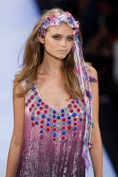 Abbey Lee in Diane von Furstenberg Spring 2009